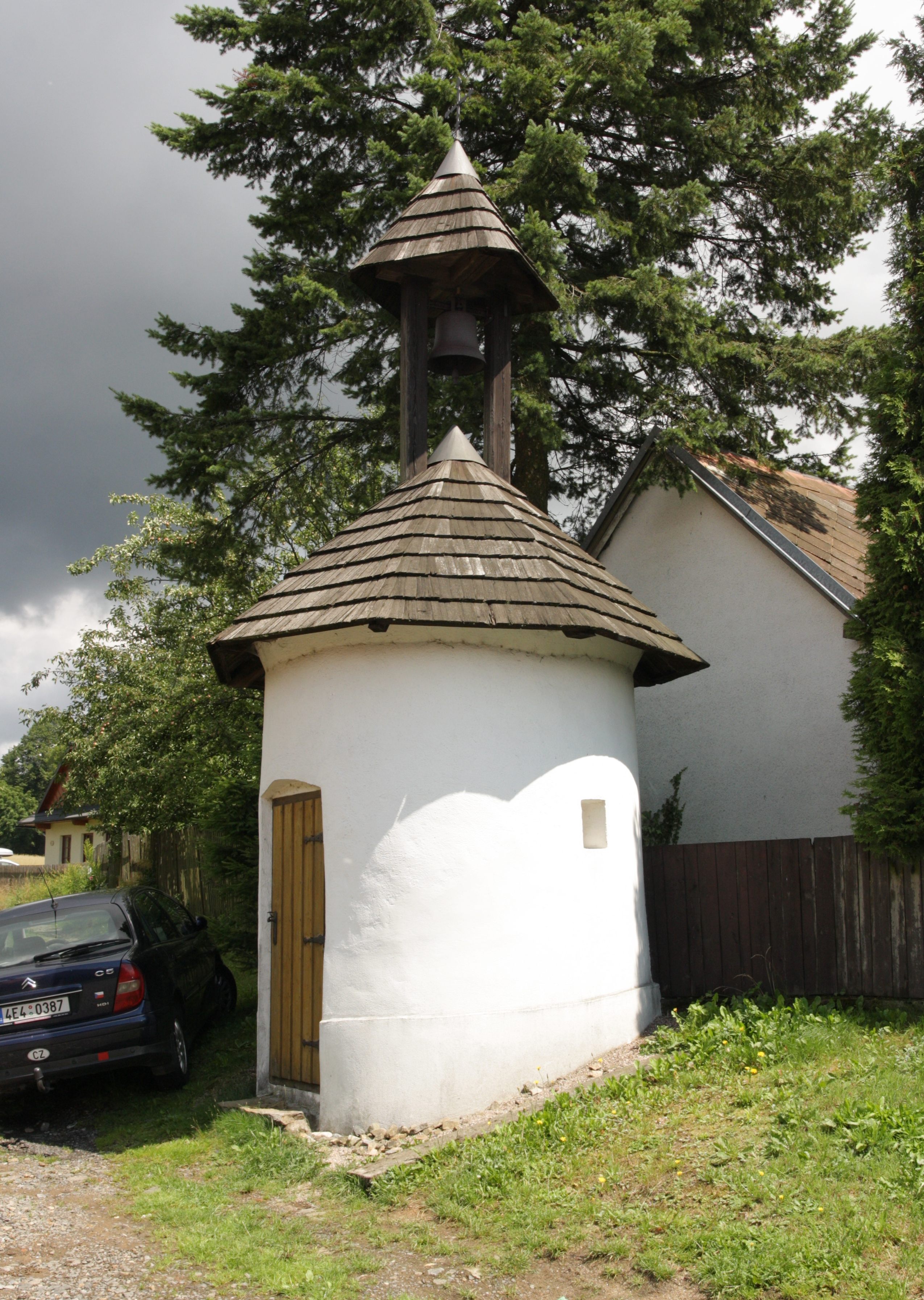 Cikháj - zvonička v centru obce.